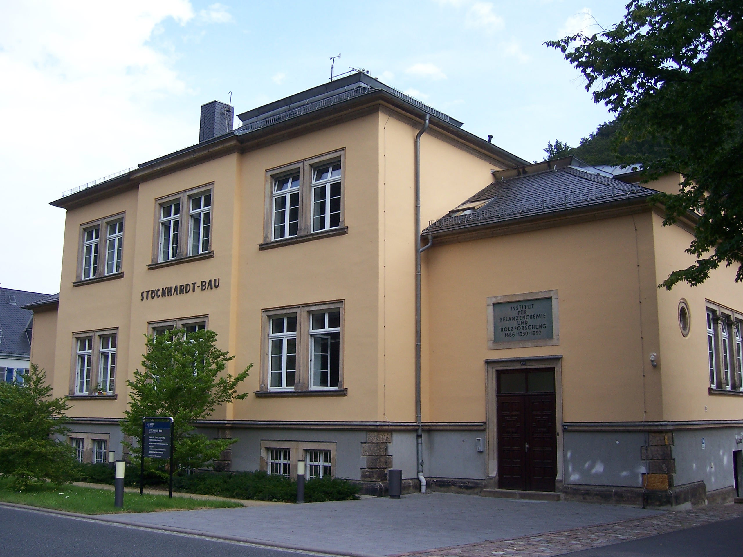 Stöckhardt-Bau der TU Dresden in Tharandt